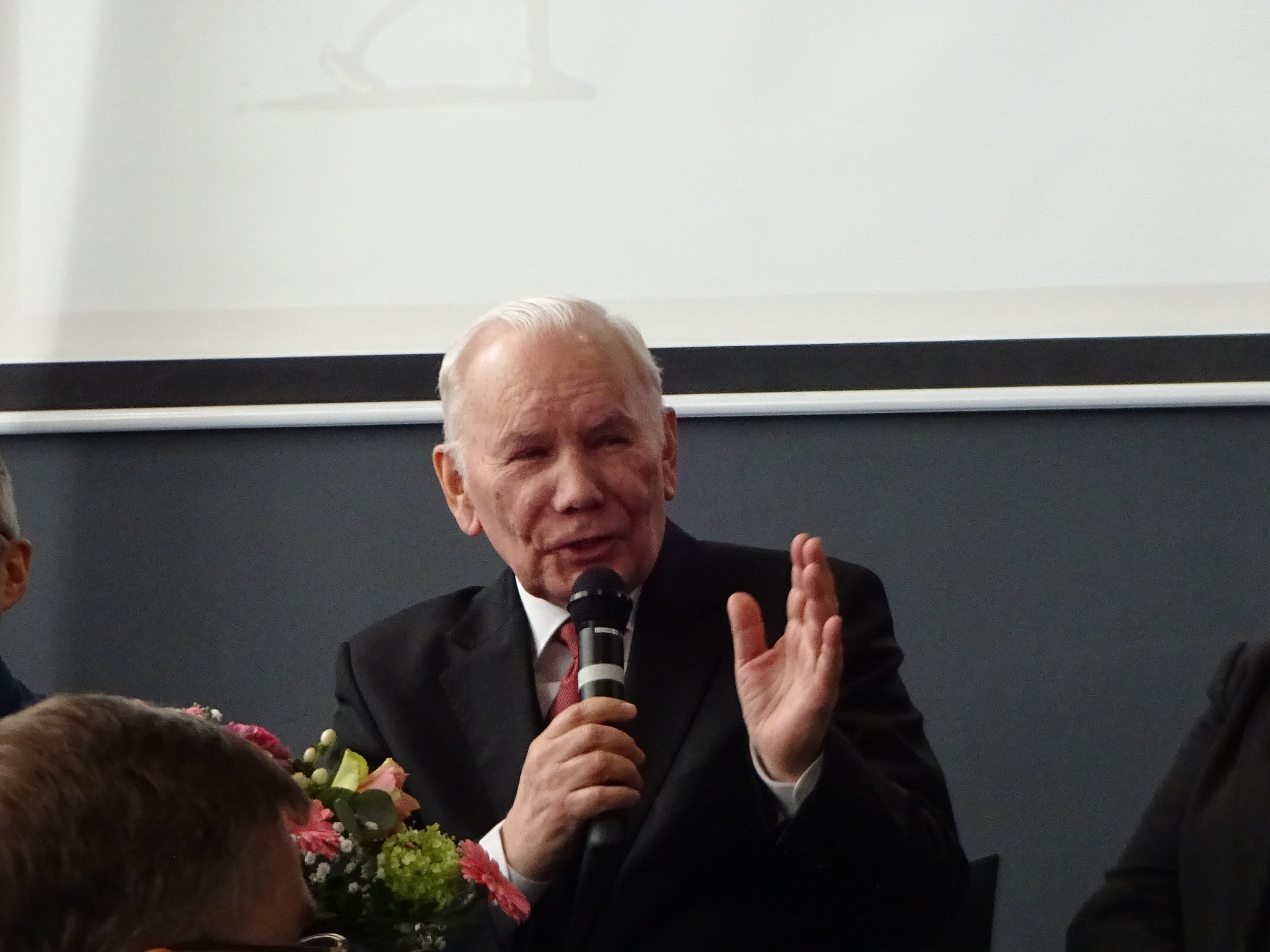 Kredytowa 1, Roman Lipiński, 2018-03-17